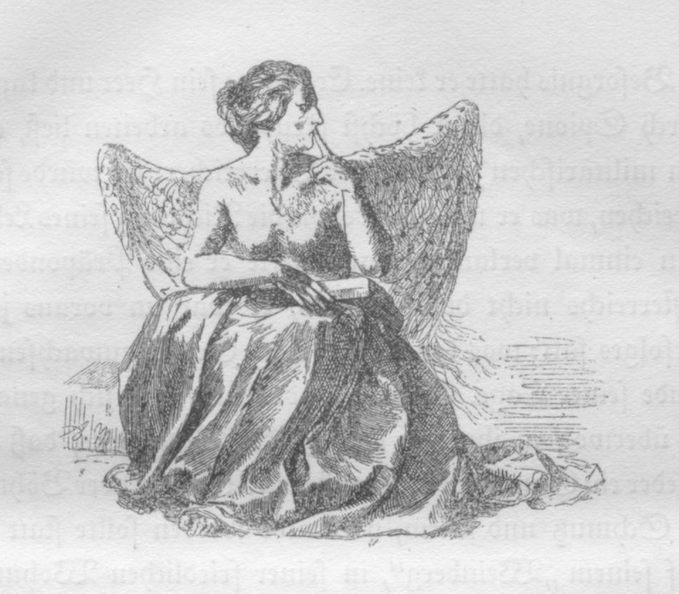 „Tage des Königs“ von Bruno Frank, Erstausgabe von 1924, Vignette von Adolph von Menzel zu dem Kapitel „Die Narbe“.